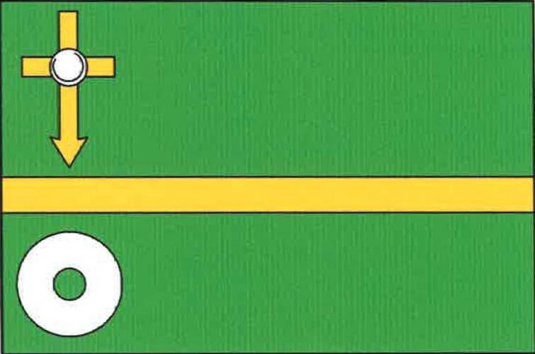 vlajka, Cejle, okres Jihlava